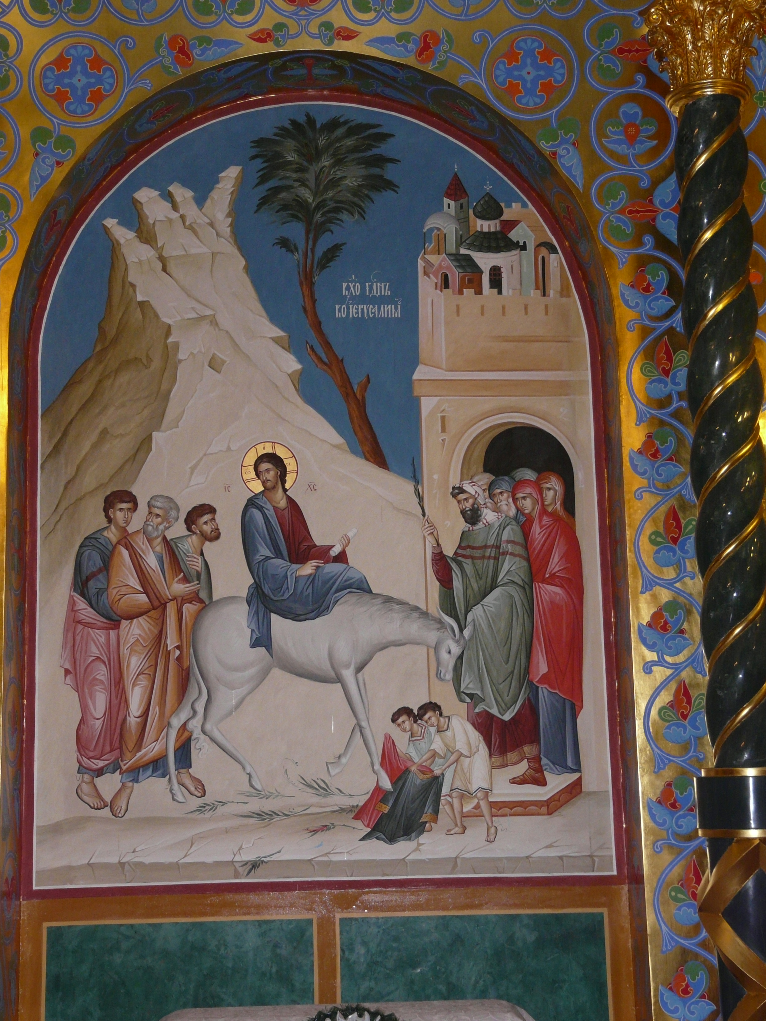 Odessa: Verklärungskathedrale-Einzug in Jerusalem